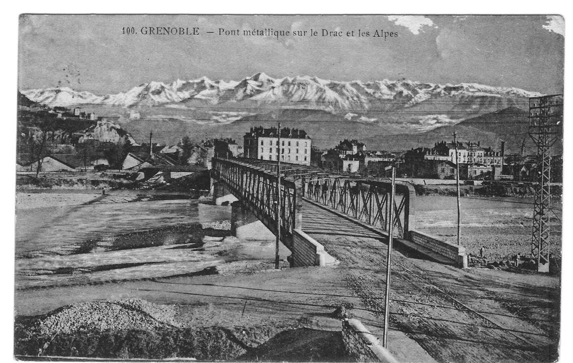 Grenoble, pont sur le Drac où passait deux lignes de tramways. Actuellement c'est l'emplacement du pont du Vercors et les tramways passent depuis 1987 sur le pont bleu appelé pont du Drac.